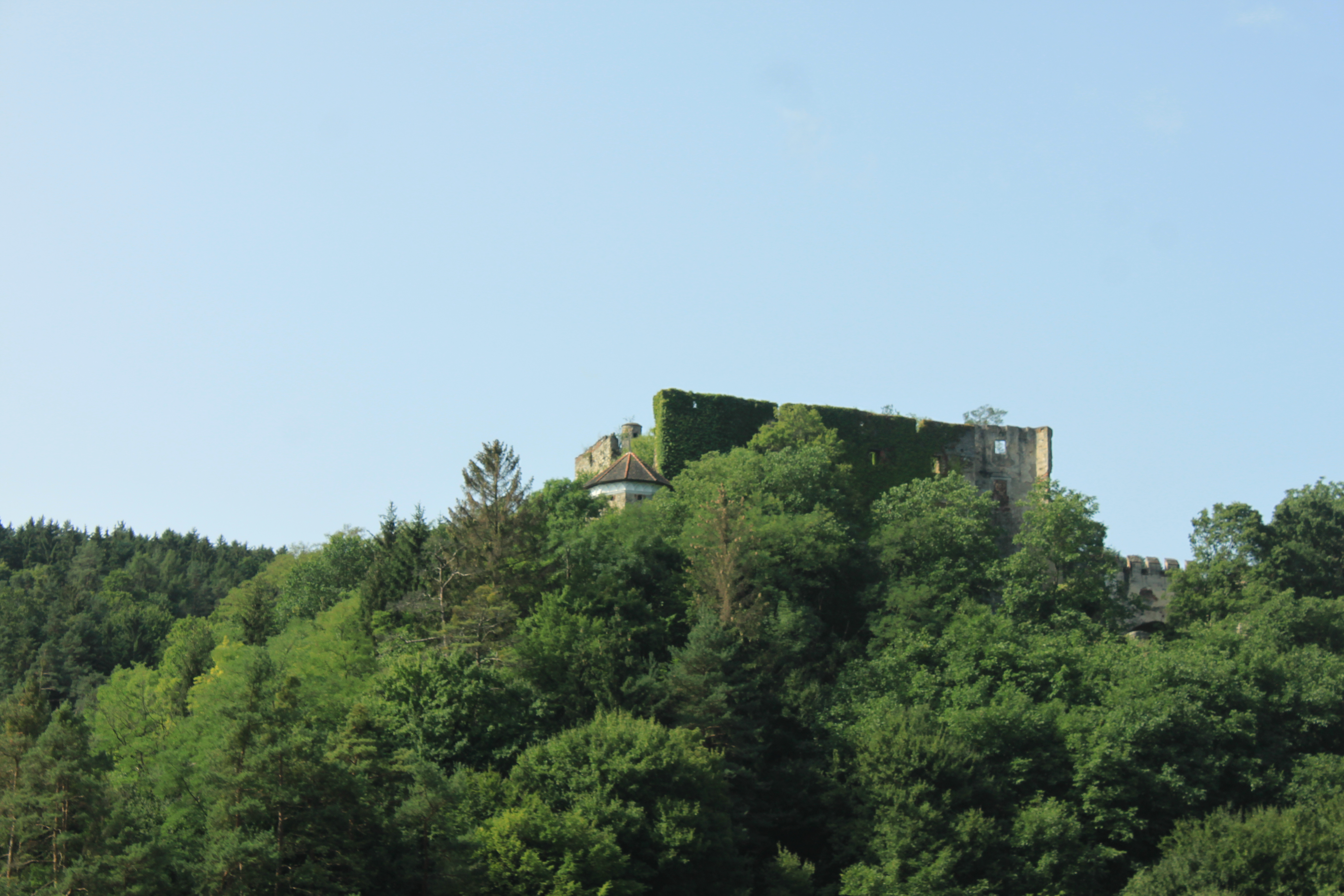 Burgruine Mollenburg, von der Durchfahrtsstraße in Weiten aus, nähe Feuerwehrhaus aus